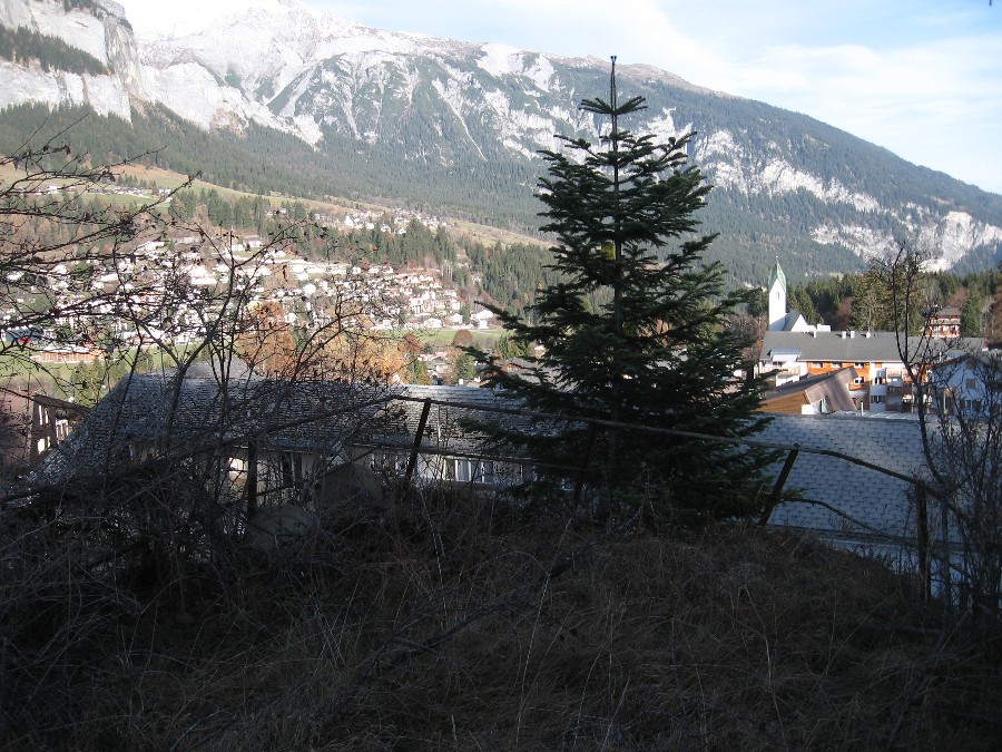 Über dem Hotel Segnes gab es einen Aussichtspunkt, zu welchem ein Flanierweg führte; das Geländer und der Verlauf des Weges sind noch sichtbar trotz dichtem Geäst.